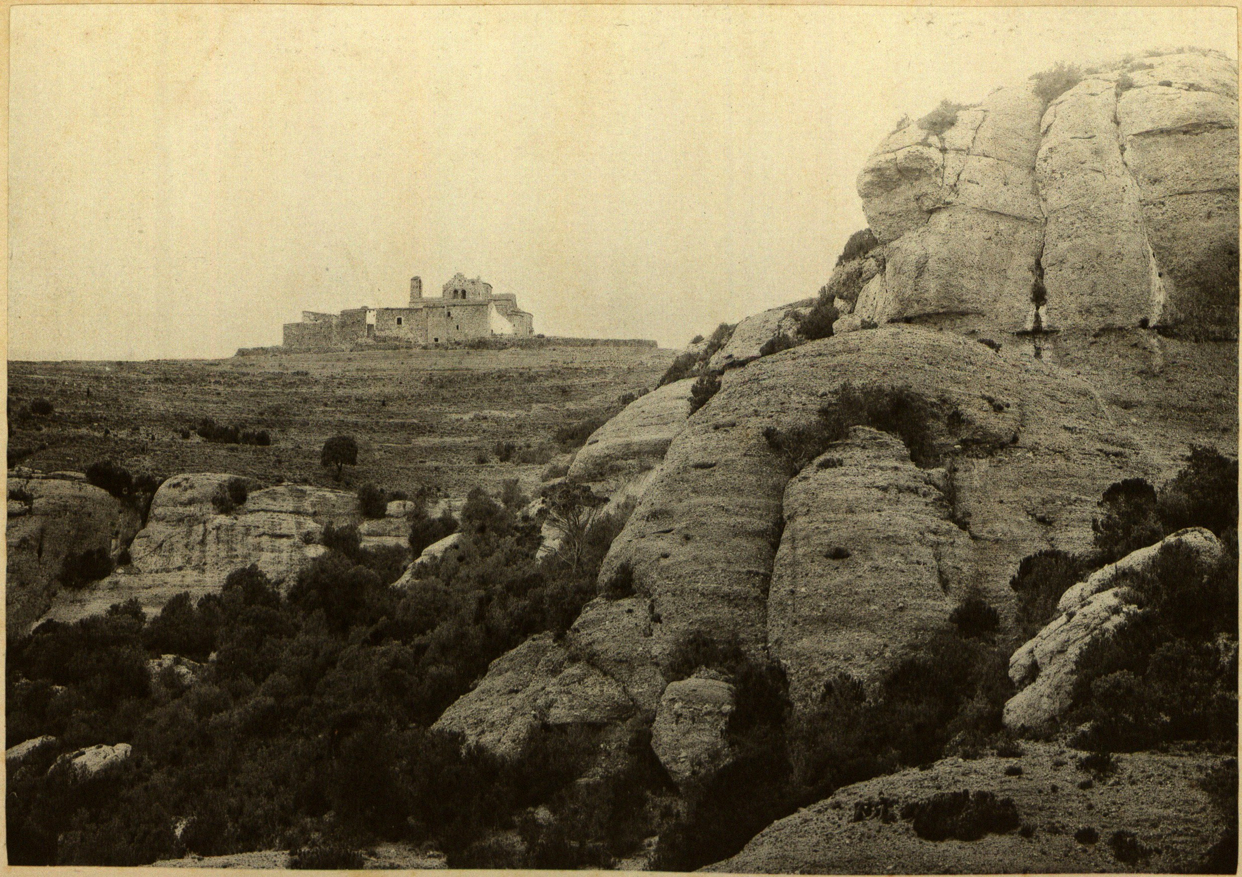 'Sant Llorenç del Munt', fotografia d'Heribert Mariezcurrena (~1878). Estampa núm. 21, acompanyada de text explicatiu, a l'Album Pintoresch-Monumental de Catalunya: aplech de vistas dels més notables monuments i paisatjes d'aquesta terra acompanyadas de descripcions y noticias históricas y de guias pera que sían fácilment visitats, publicat per l'Associació Catalanista d'Excursions Científiques el 1878. De disposició lliure al dipòsit digital de documents de la UAB.